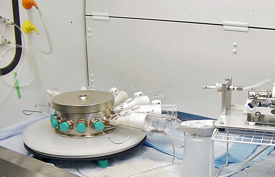 Inhalation experiment for LC50 using 6 rats (Wistar) 2005 ETSU Dept. Pharmacology.